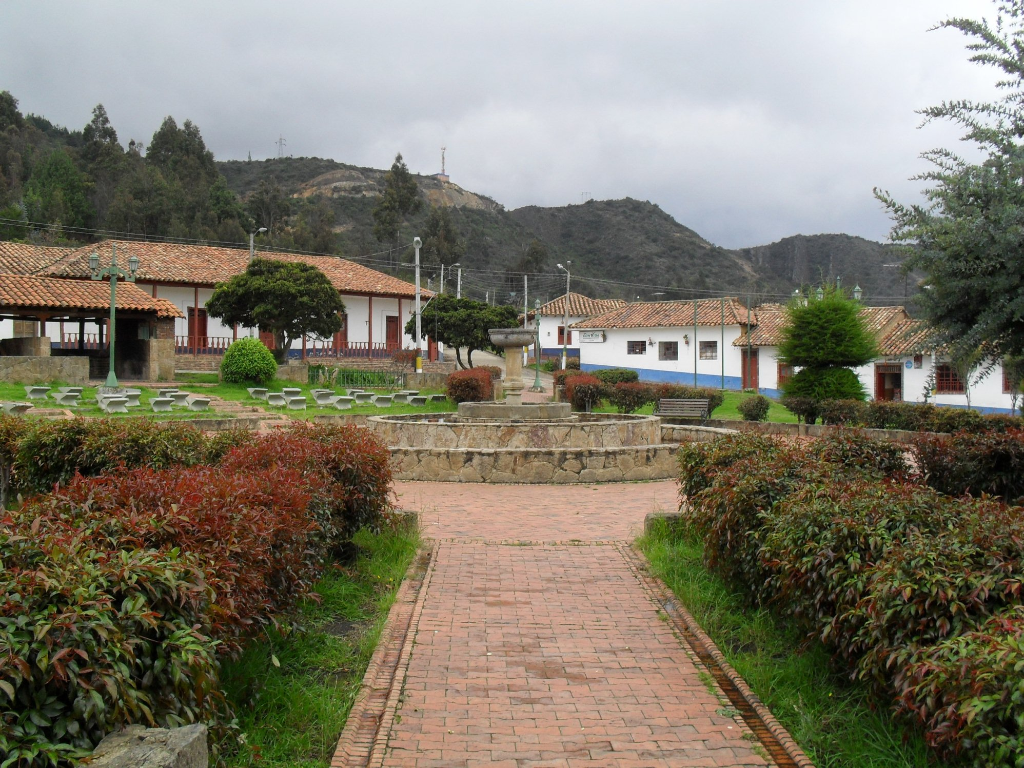 Parque principal del municio de Fúquene, Cundinamarca, Colombia